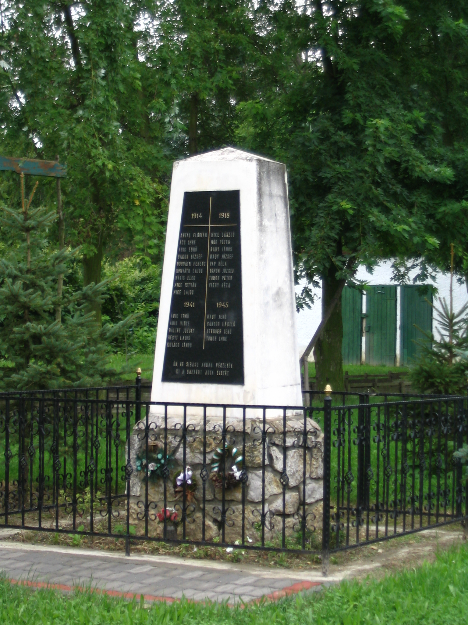 Világháborús emlékmű (Kisszőlős, Veszprém megye)